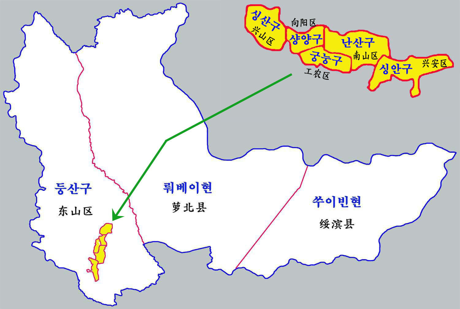 허강시 현급구역